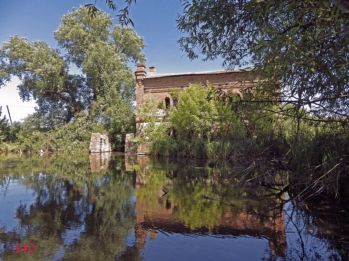 Млин, Новофастів, вул. Садова